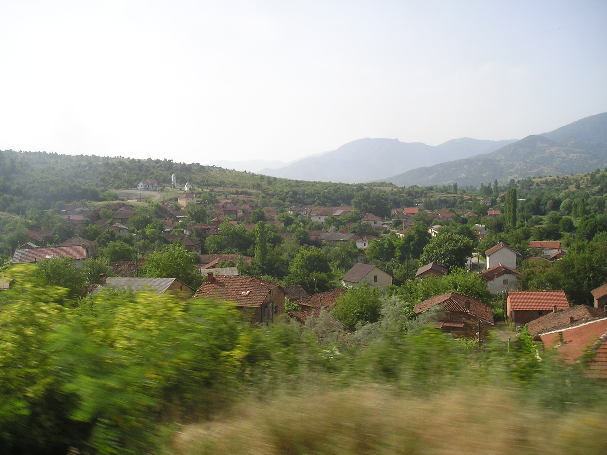 Село Теово, велешко